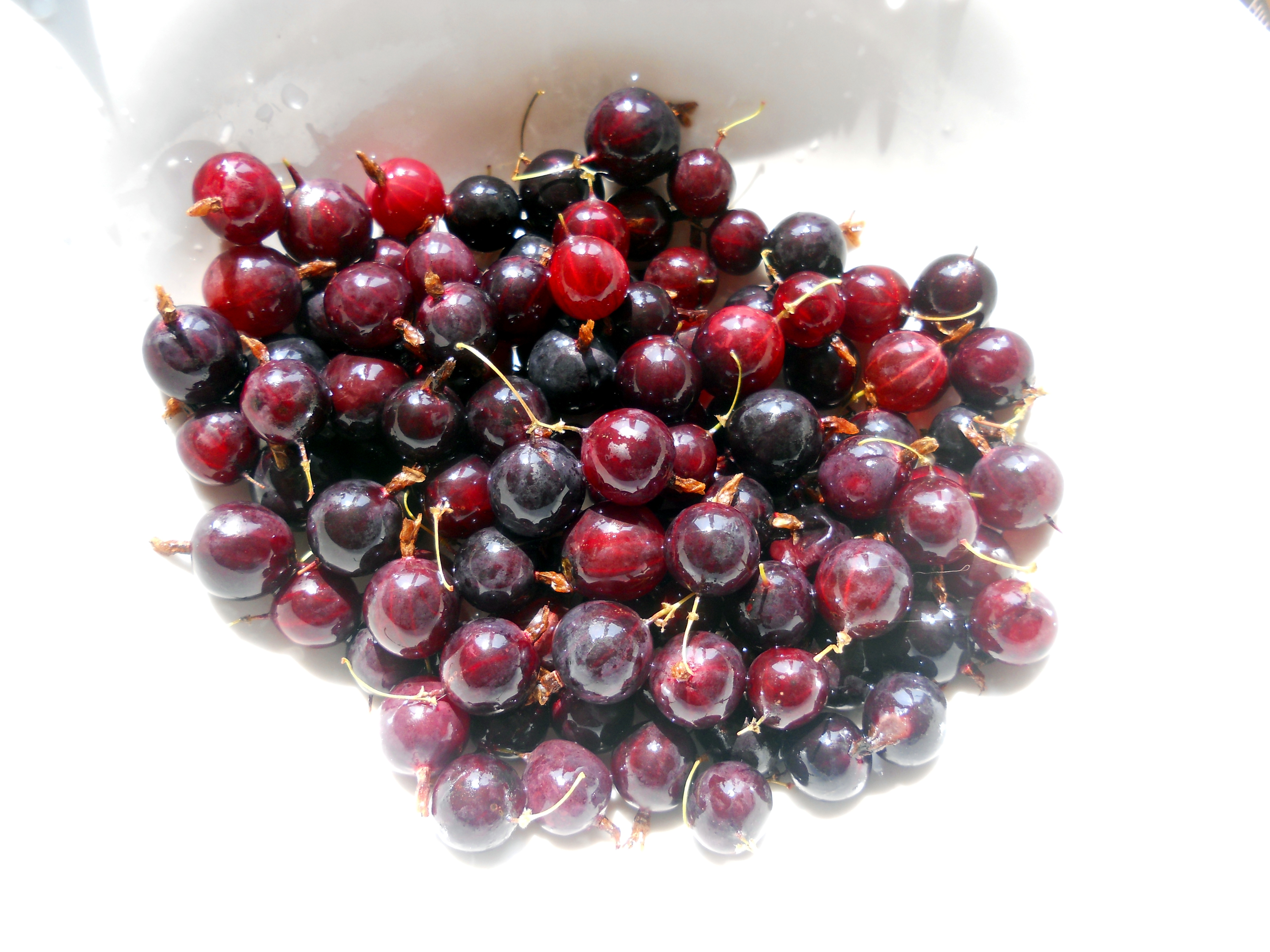 Чорний агрус з Чернігова, 2016 рік.